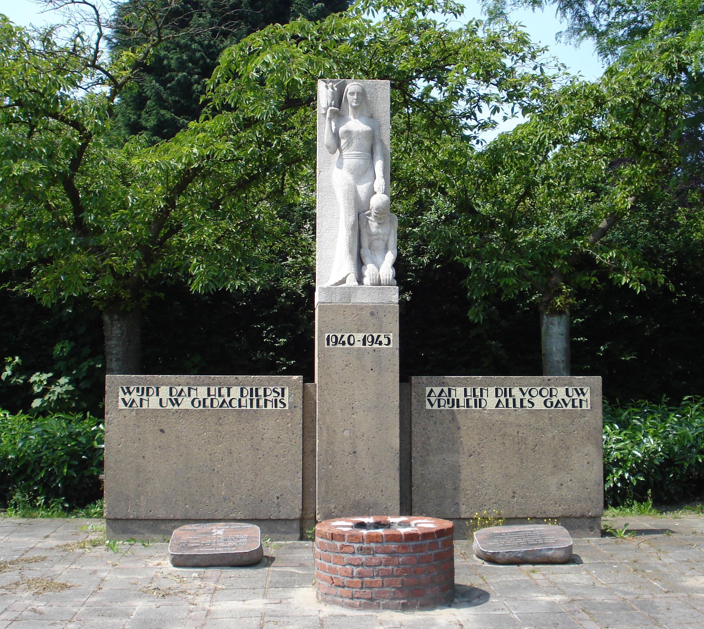 Rotterdam, Oud-IJsselmonde. Monument 40-45 van Piet van den Eijnde. Rotterdam/The Netherlands